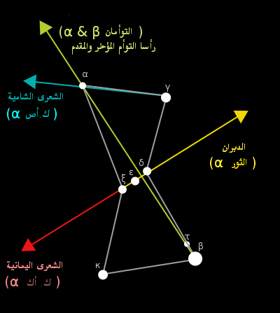 استخدام كوكبة الجبار في العثور على نجوم الدبران والعشرى الشامية واليمانية ورأسي التوأم المقدم والمؤخر.